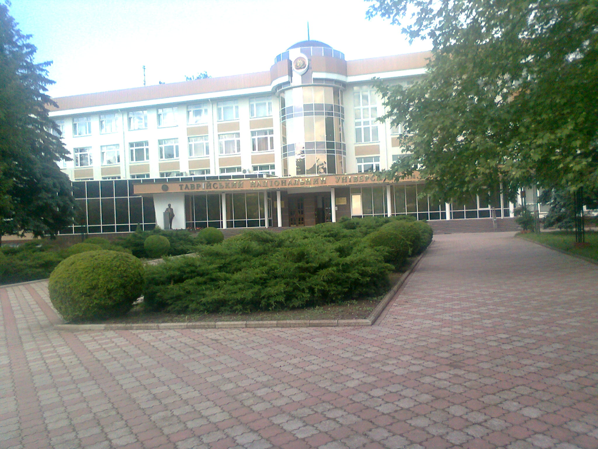 Главный вход ТНУ